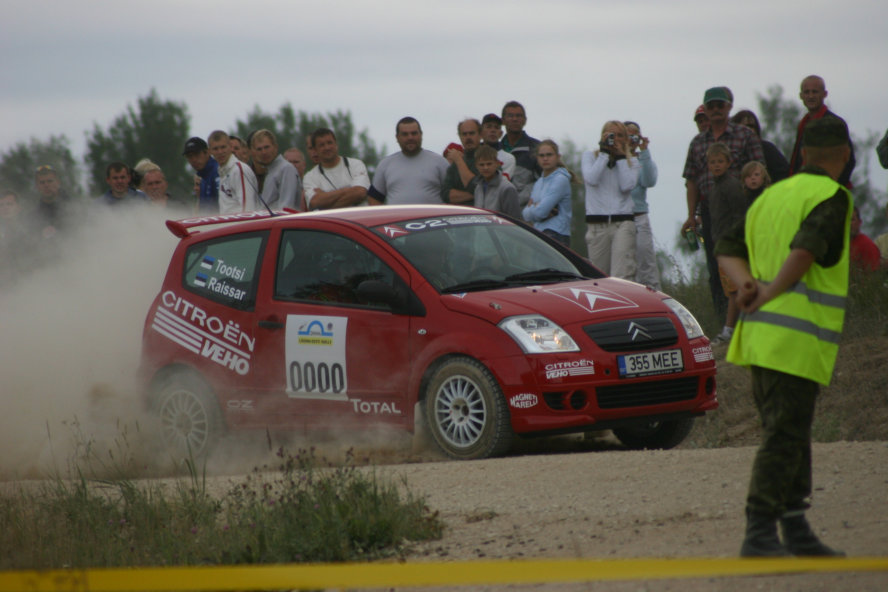 Lõuna-Eesti ralli 2006. Roolis Andrus Raissar.